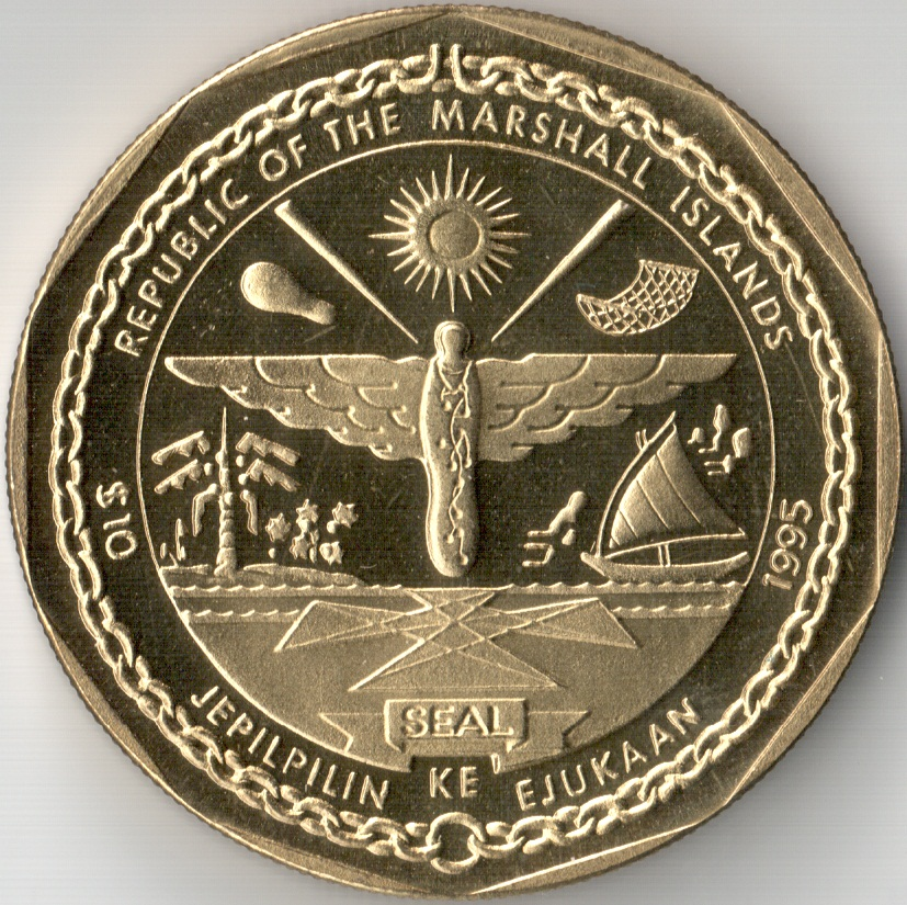 Marshall islands 10 dollars 1995 Elvis Presley